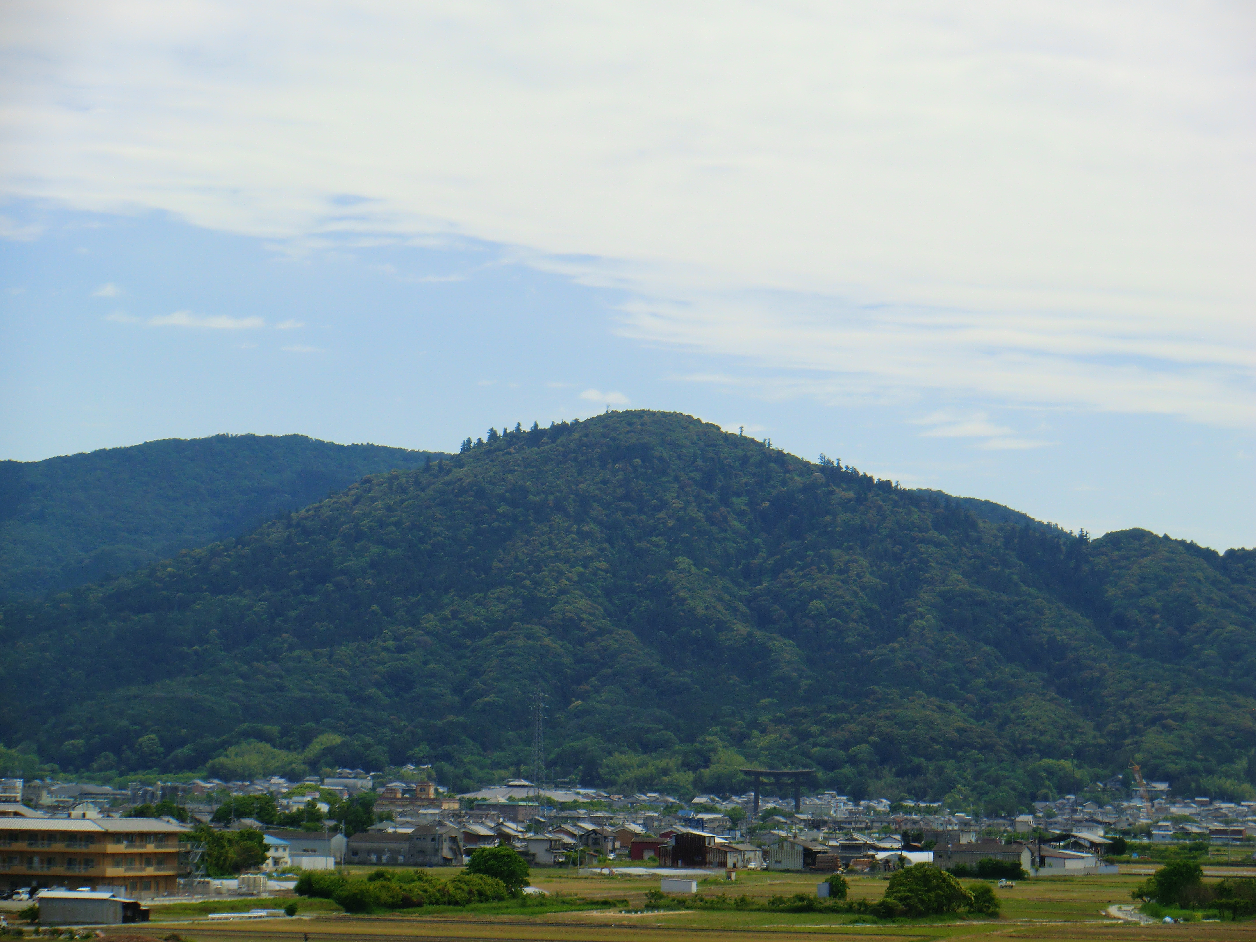 奈良県橿原総合庁舎屋上庭園から望む三輪山。